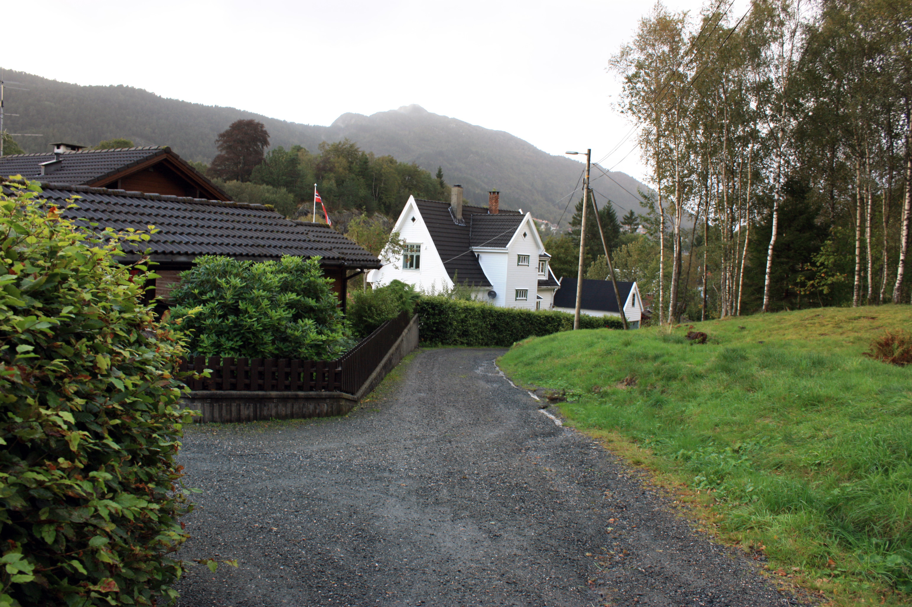 Allébakken, Fana, Bergen.